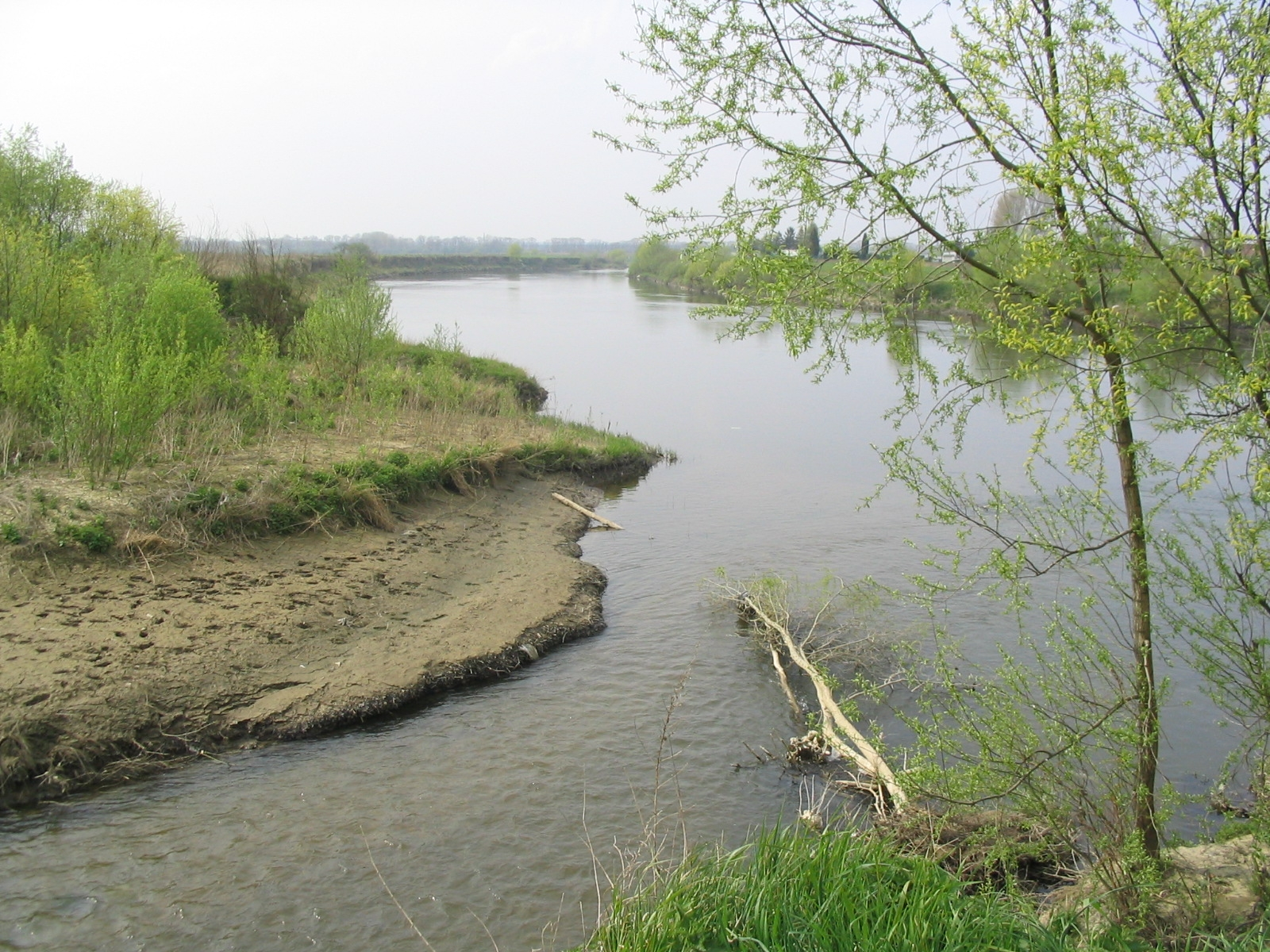 De monding van de Geul bij Voulwammes Gemaakt door Gebruiker:Gdonners